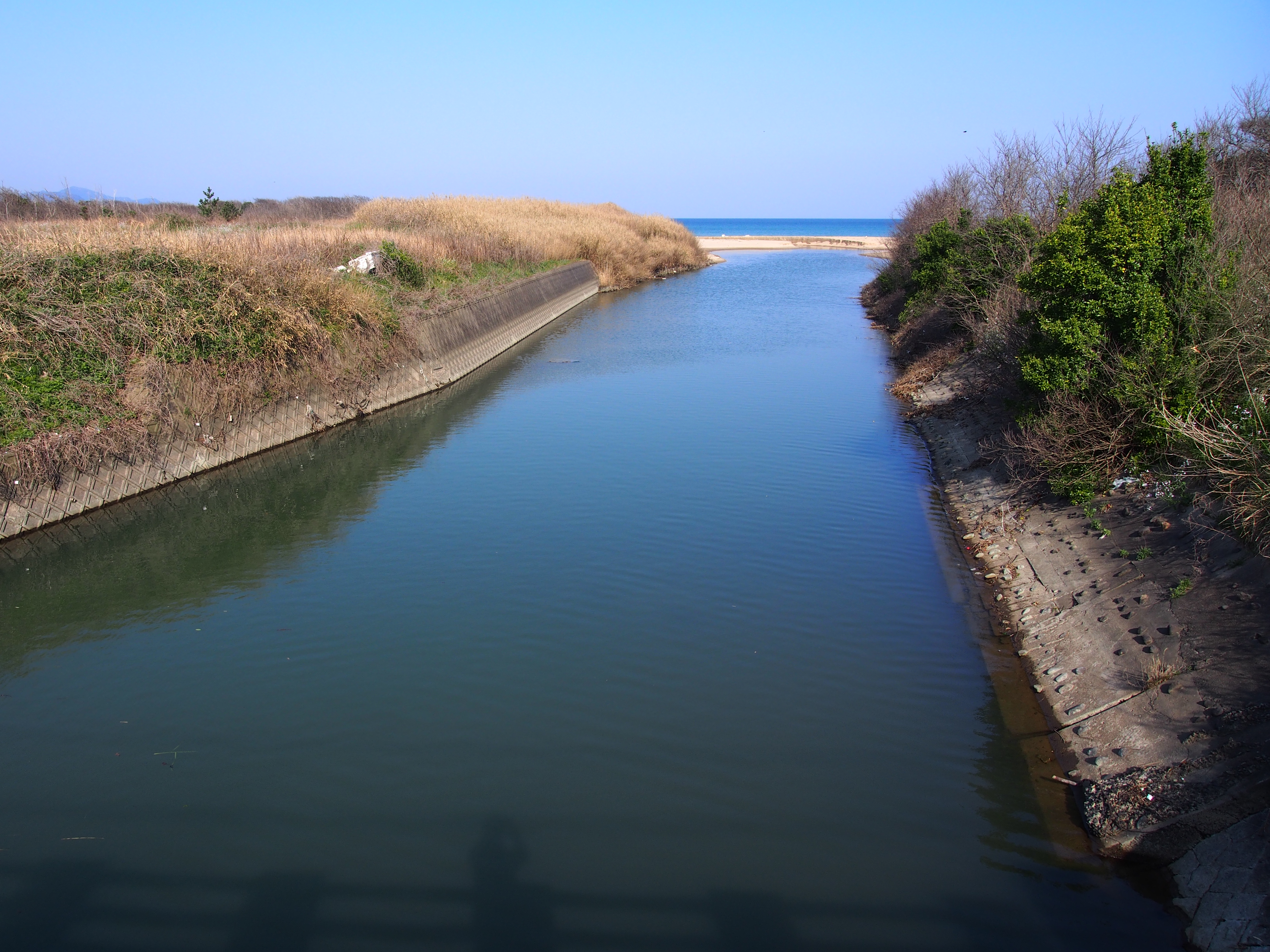 木津川（きつがわ）河口付近（浜詰橋より撮影） 京都府京丹後市網野町浜詰